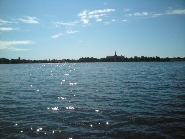 Vadstena slott, sjösidan